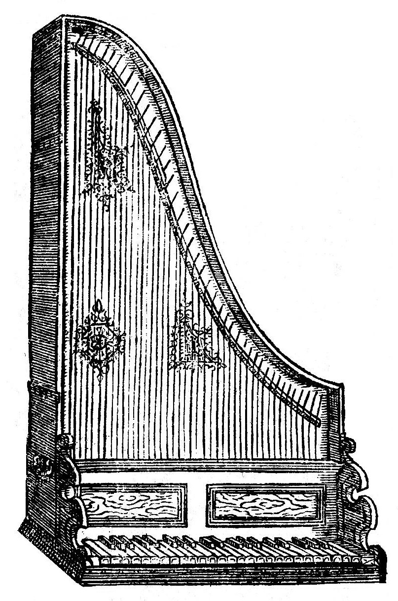 Gravure de clavicytherium (Syntagma Musicum)